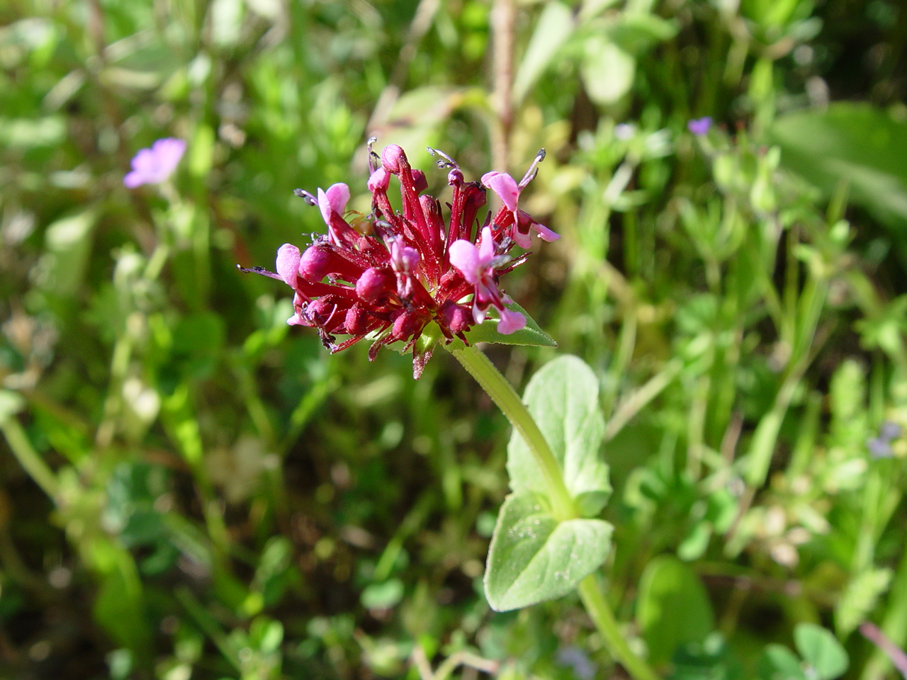 Name Fedia cornucopiae Familiy Valerianaceae